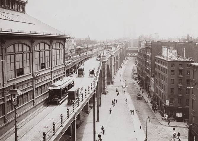 Rampe der Brooklyn Bridge in Manhattan